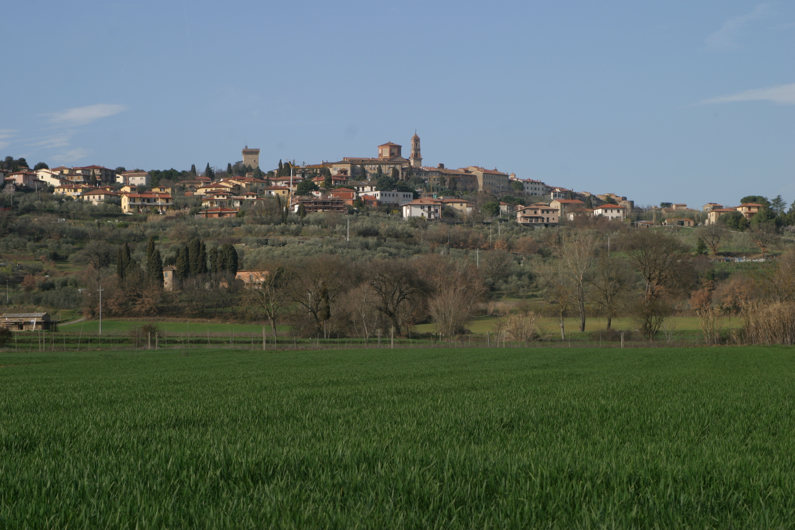 Lucignano panorama (Arezzo, Tuscany, Italy)